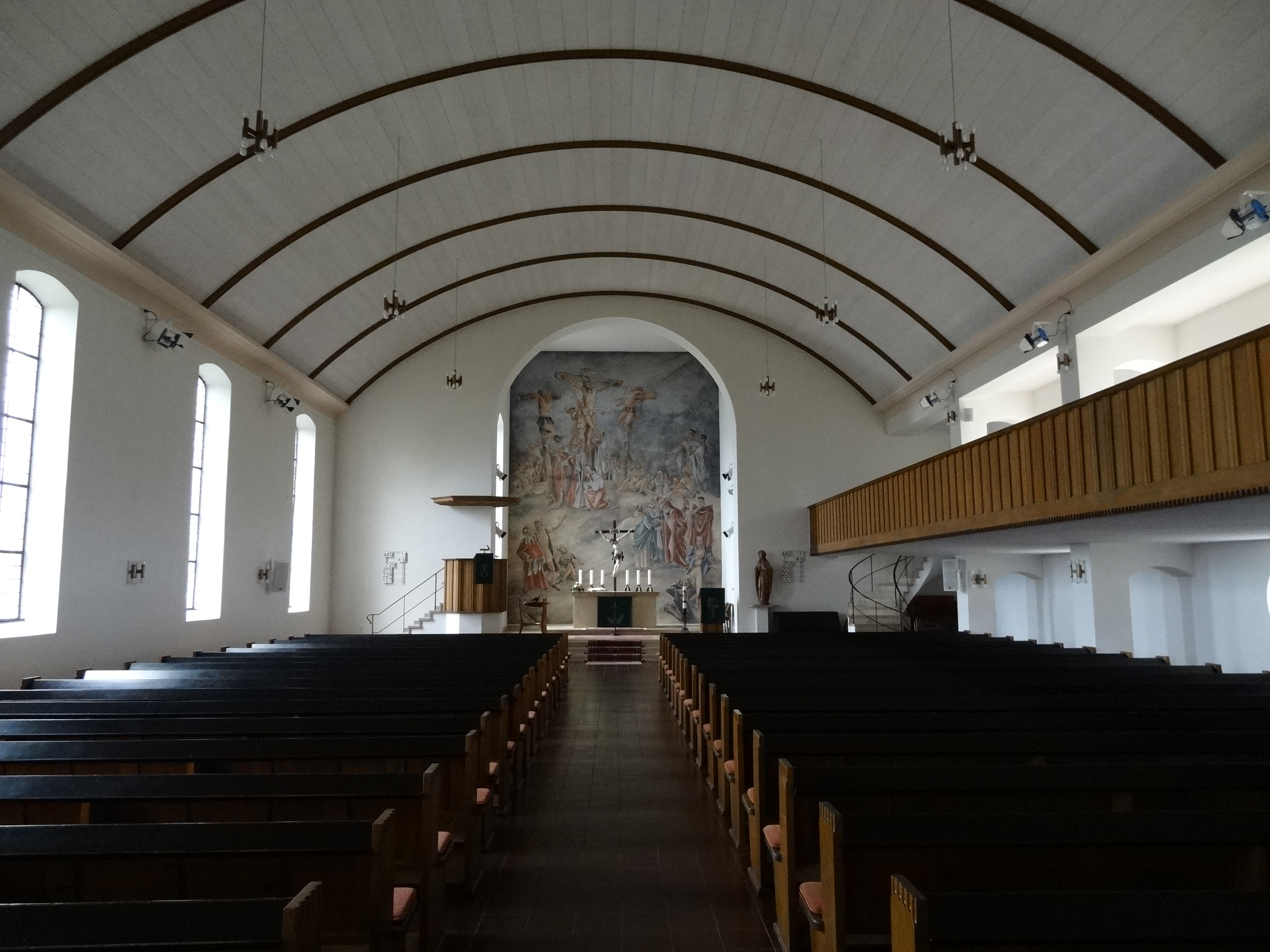 Evangelische Kirche Watzenborn-Steinberg